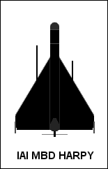 IAI HARPY Drawing